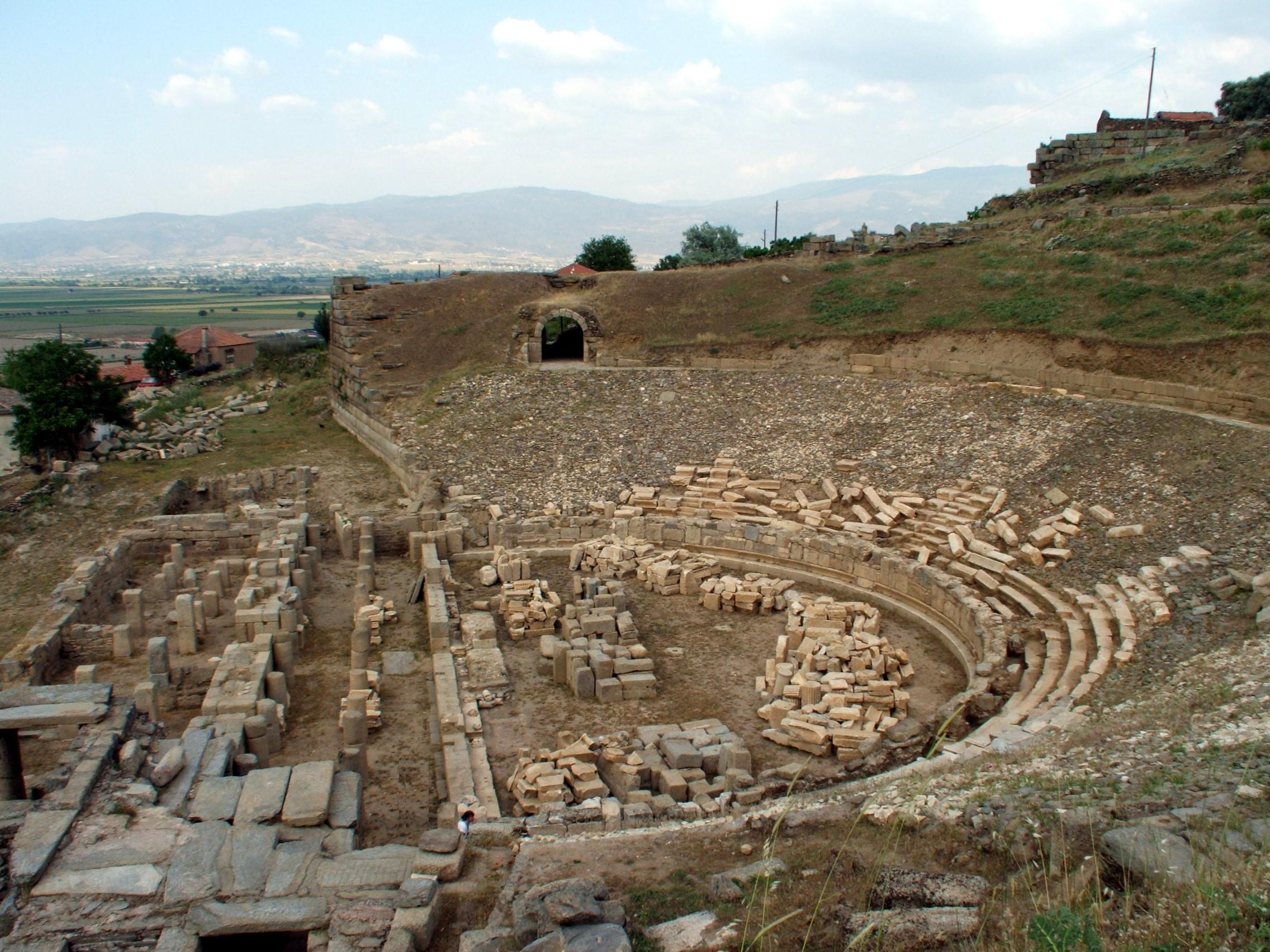 Alabanda 'Tiyatro'